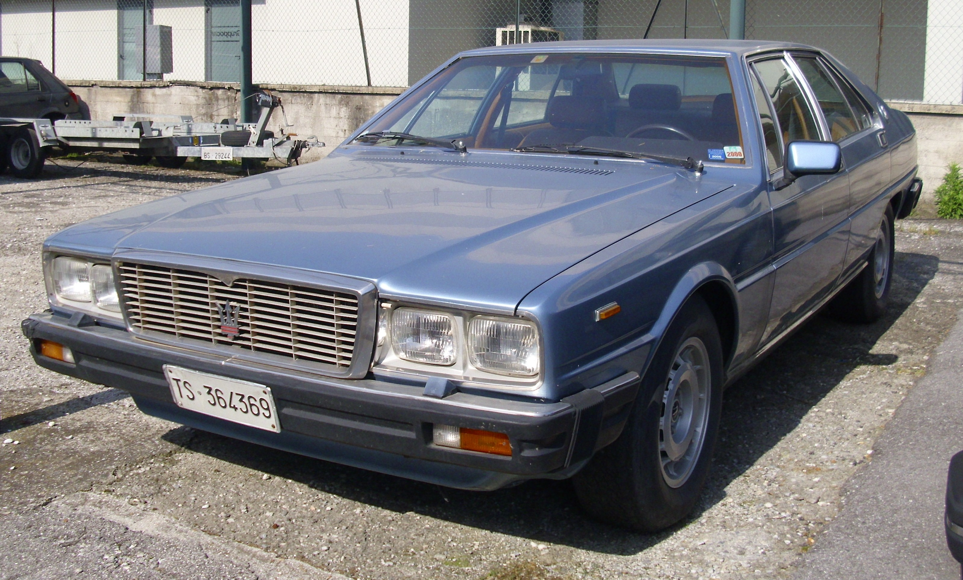 Maserati Quattroporte III von 1979